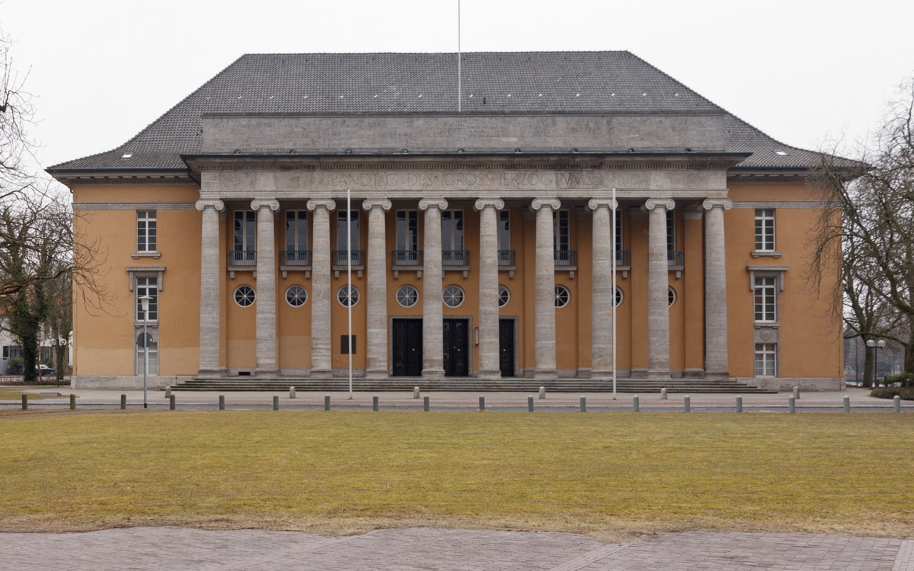 Landtag des Grossherzogtums Oldenburg